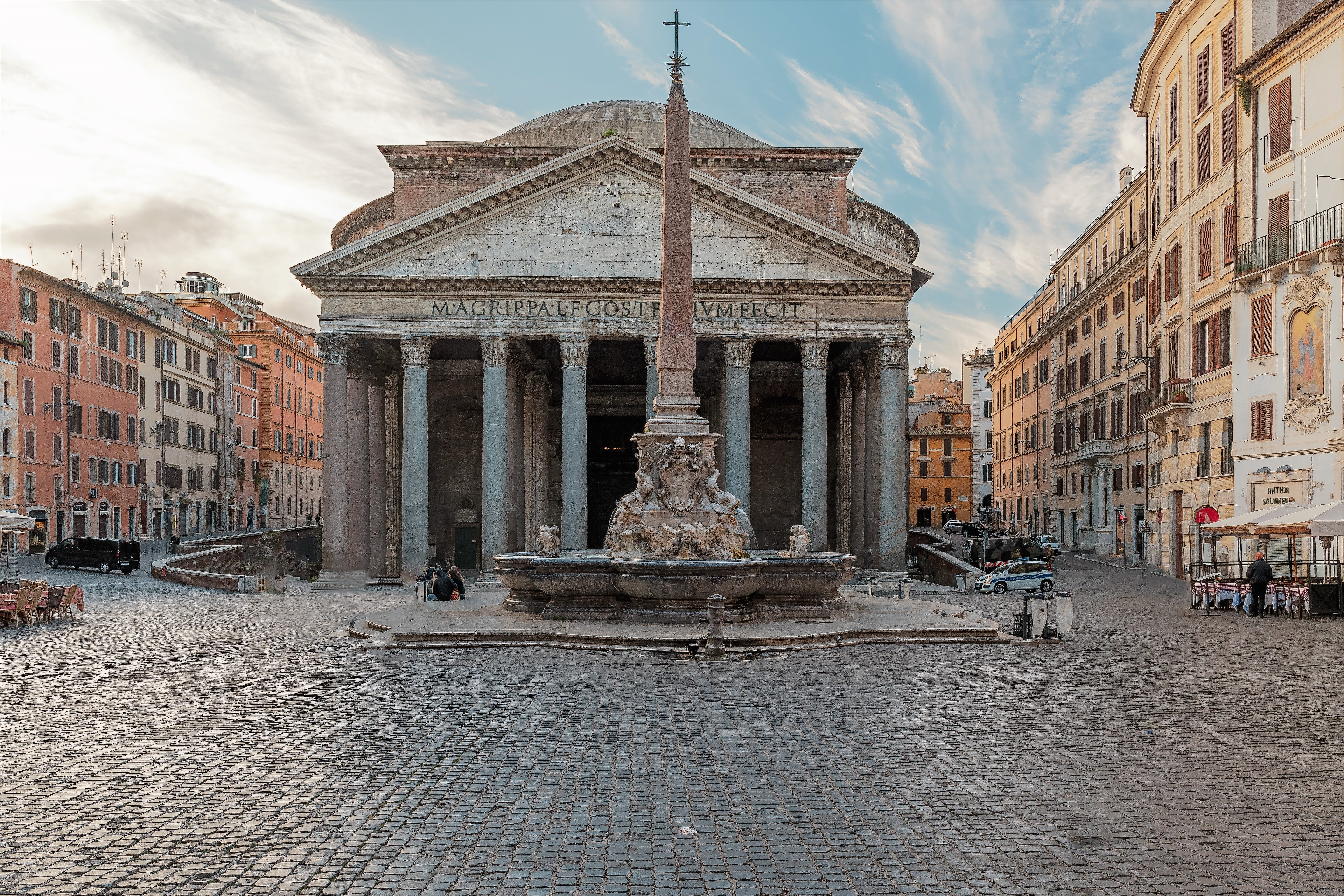 Das Pantheon in Rom. Im Vordergrund steht der ägyptische Obelisco Macuteo